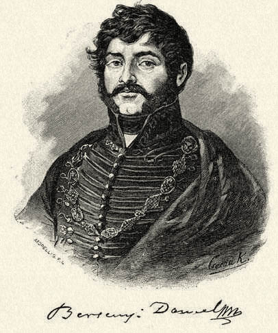 Berzsenyi Dániel (1776–1836) arcképe. Morelli Gusztáv fametszete. Megjelent Az Osztrák-Magyar Monarchia írásban és képben (1887–1901) kiadványban